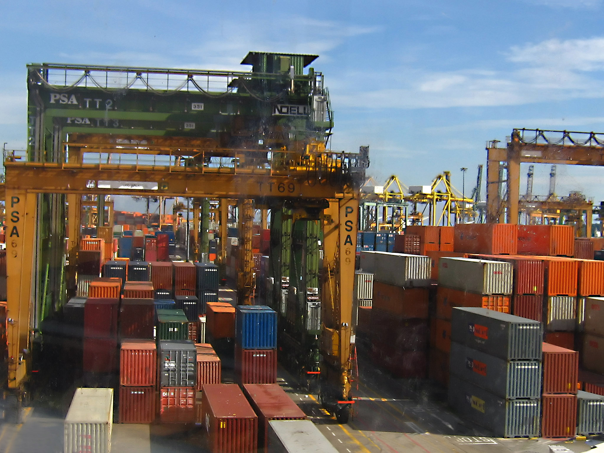 Ready to meet the demands of tomorrow. - PSA Keppel Terminal (Container Storage and Holding Area) Готовий відповідати вимогам завтрашнього дня. - PSA Keppel термінал (Контейнер для зберігання і зона очікування) Img by Calvin Teo May 2006